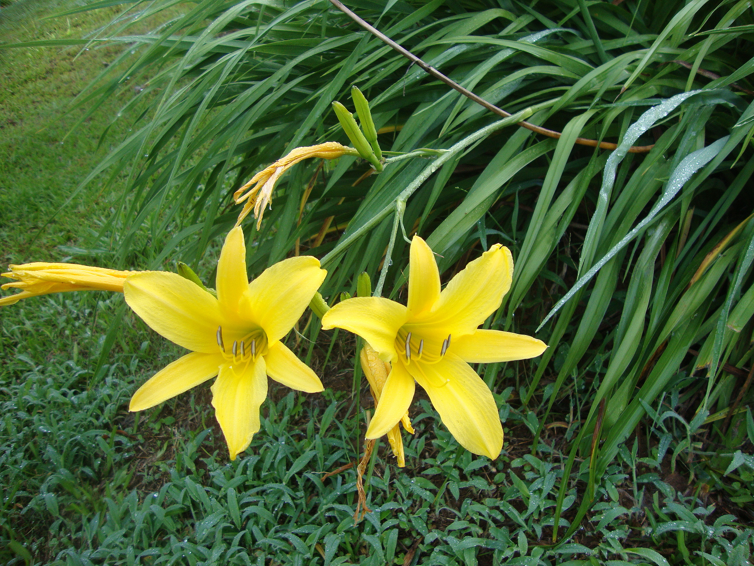 Hemerocallis lilioasphodelus L., 1753Tiếng Việt: Kim trâm, hoa hiên vàng